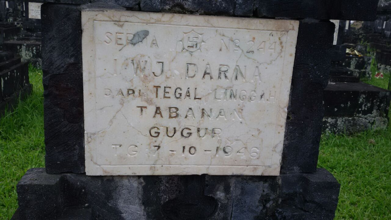 Serma no 244 WJ DARNA DARI TEGALINGGAH TABANAN GUGUR TG 7-10-1946